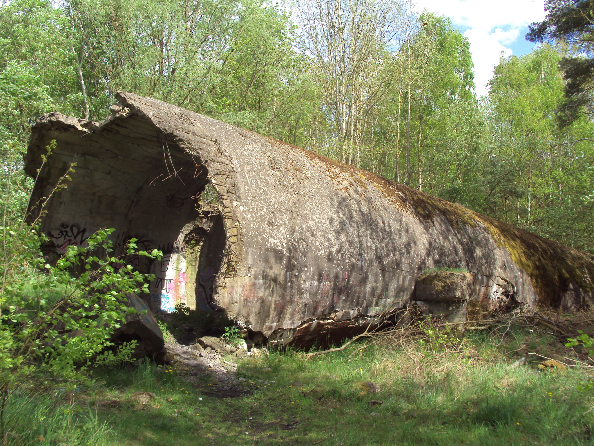 Fabryka benzyny syntetycznej w Policach, powalony komin.